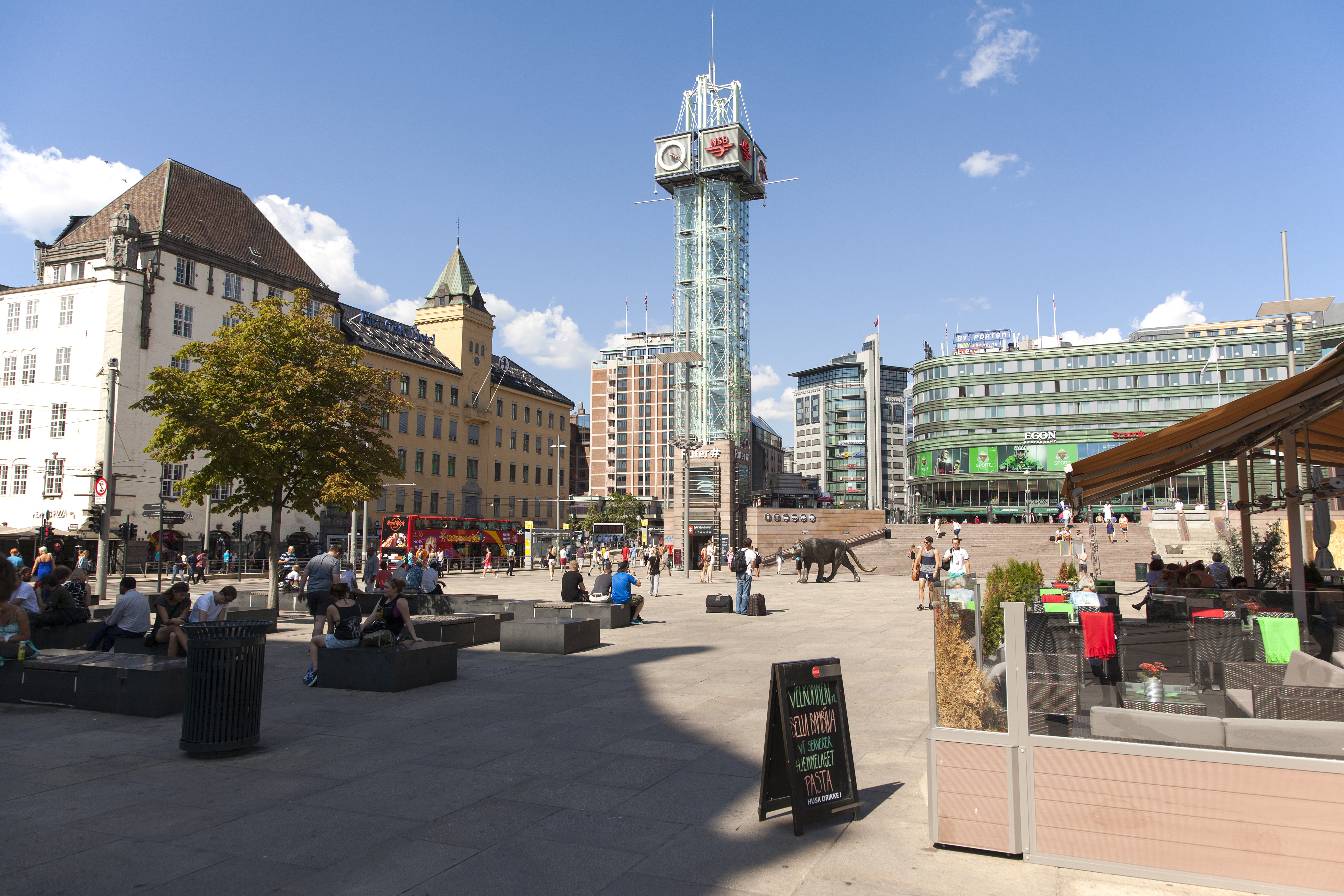 Bilde av Jernbanetorget.